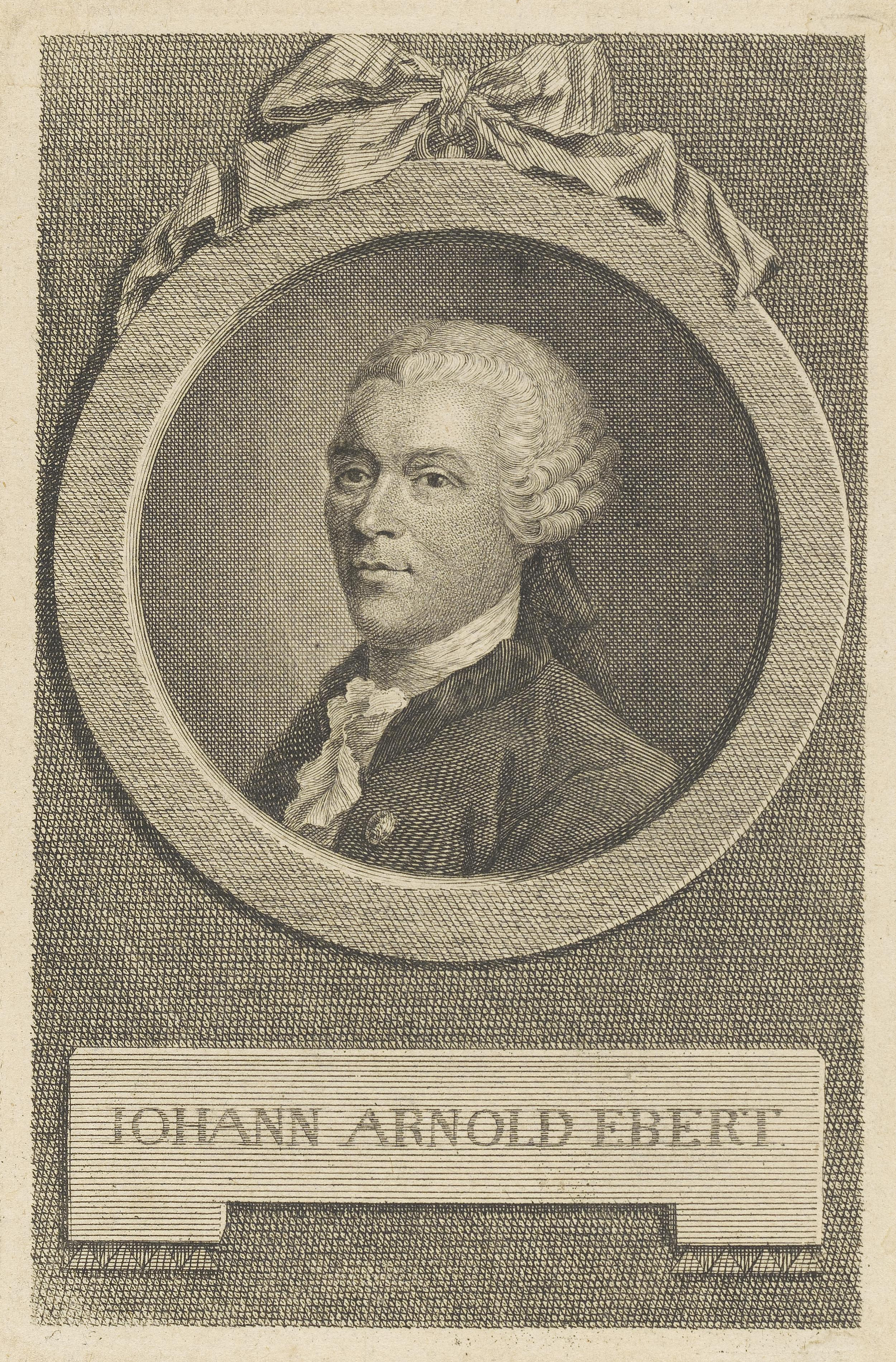 Der deutsche Schriftsteller Johann Arnold Ebert (1723-1795)